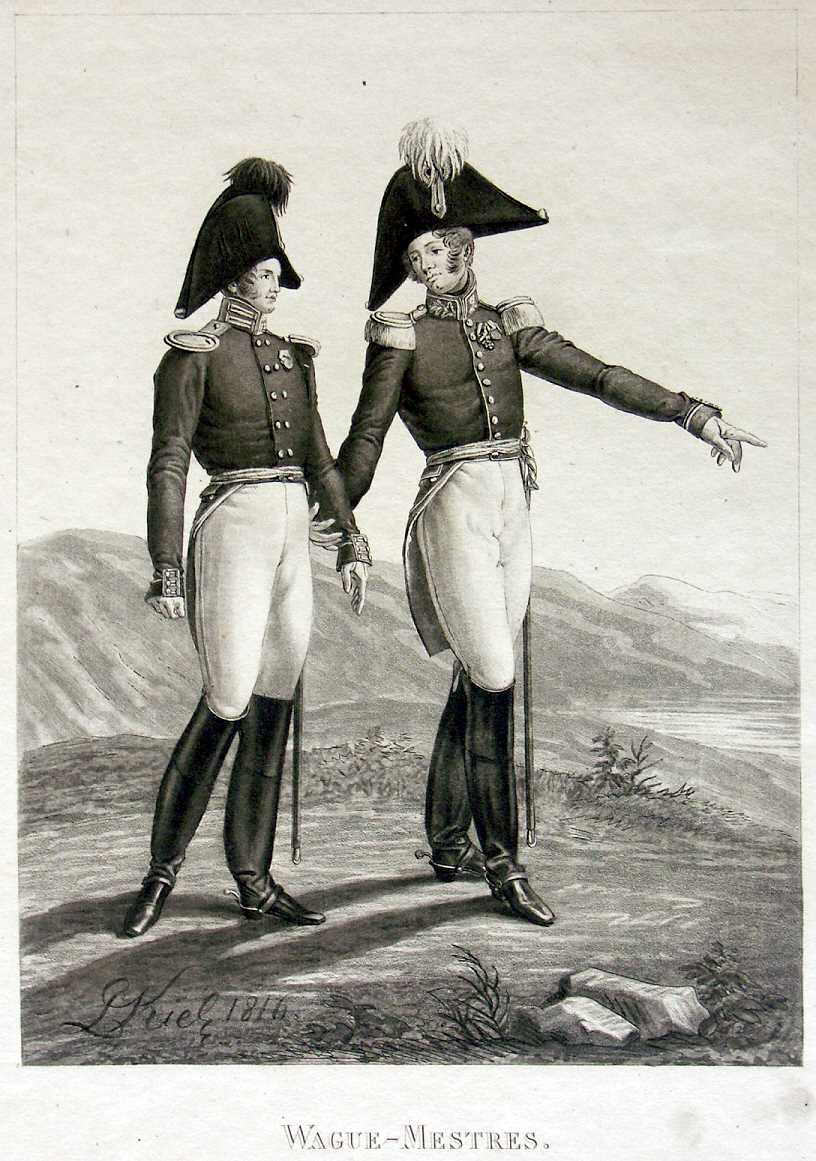 Вагенмейстеры